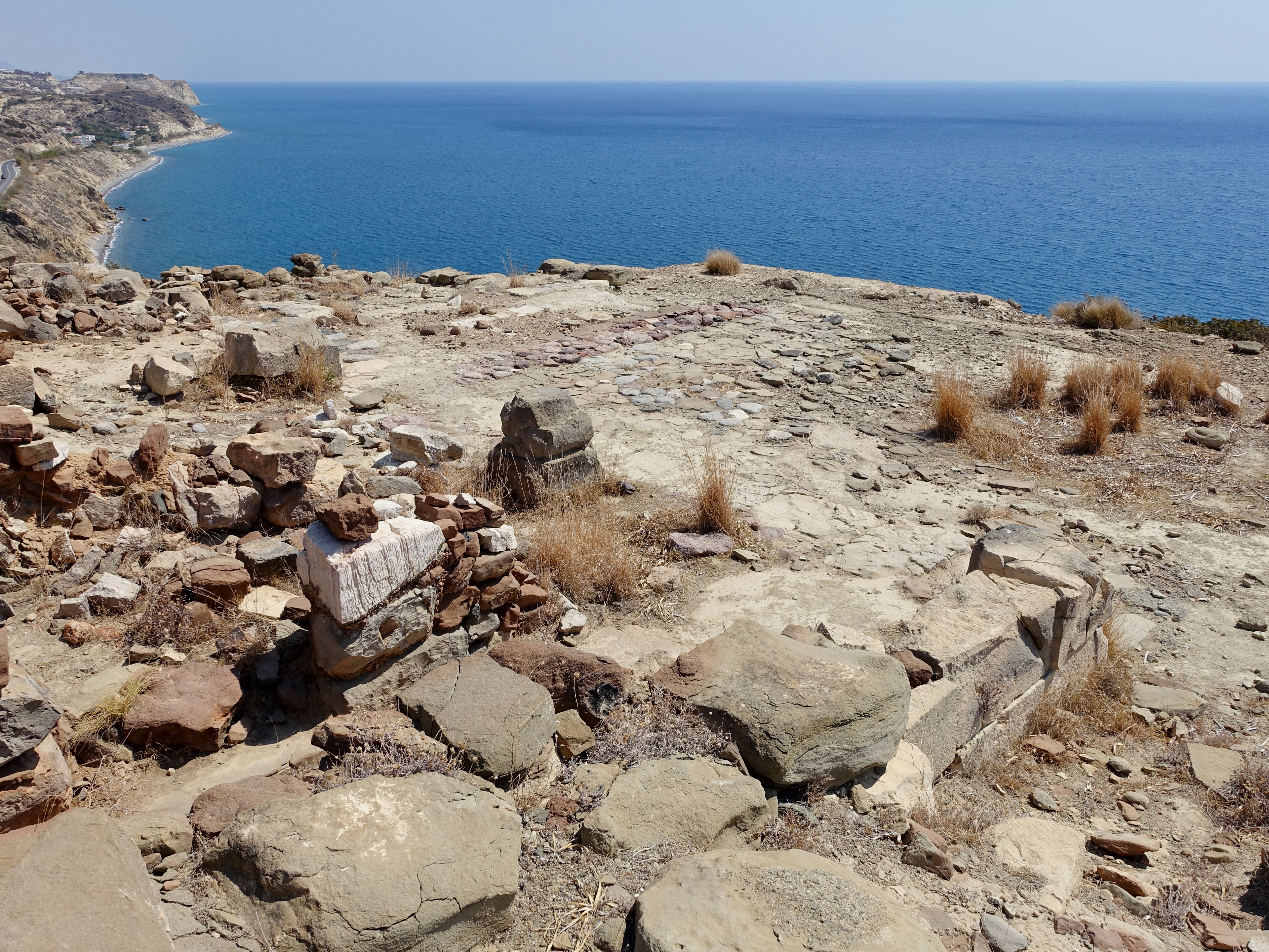 Ausgrabungsstätte von Pyrgos bei Myrtos, Kreta, Griechenland